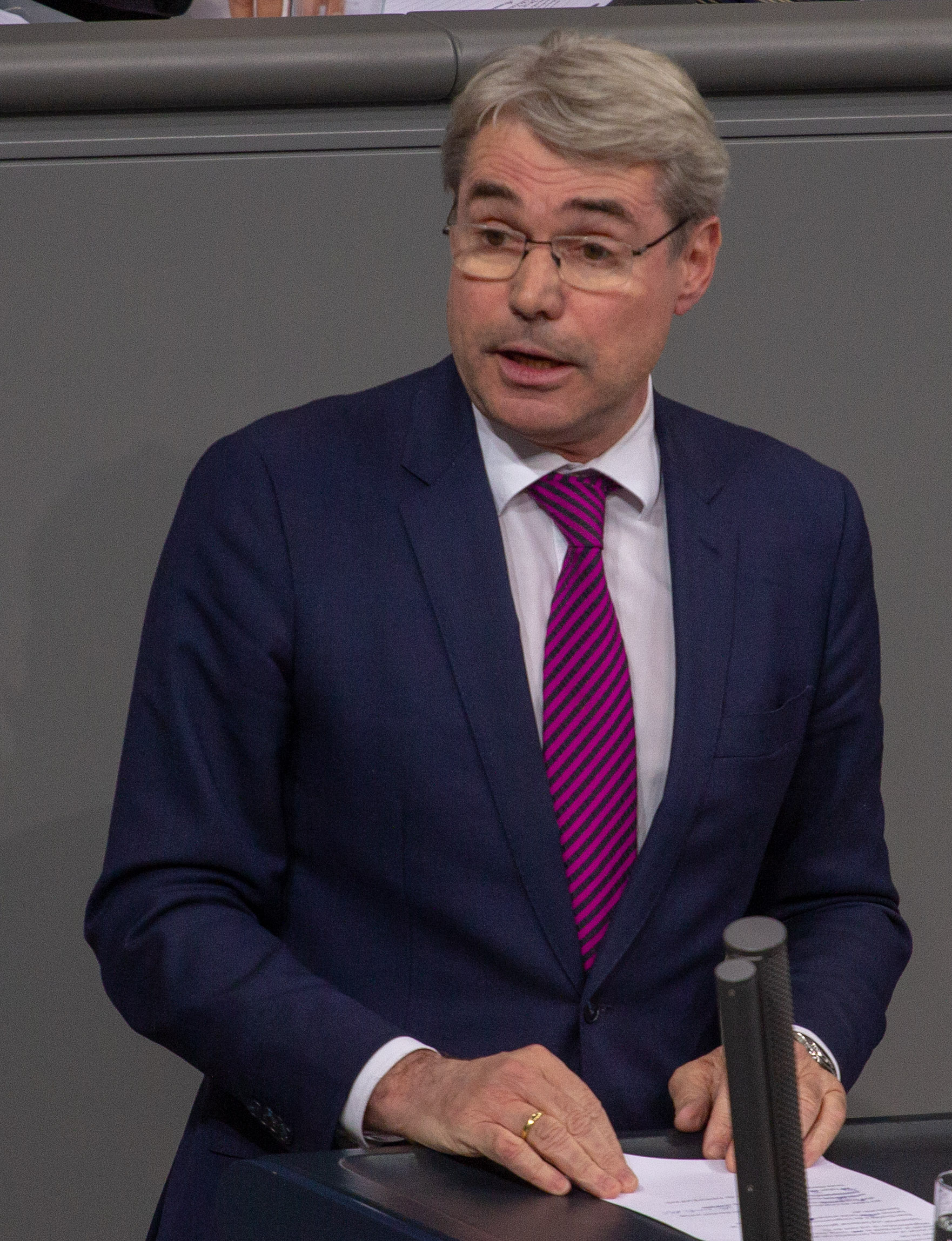 Carl-Julius Cronenberg, Mitglied des Deutschen Bundestages, während einer Plenarsitzung am 11. April 2019 in Berlin.